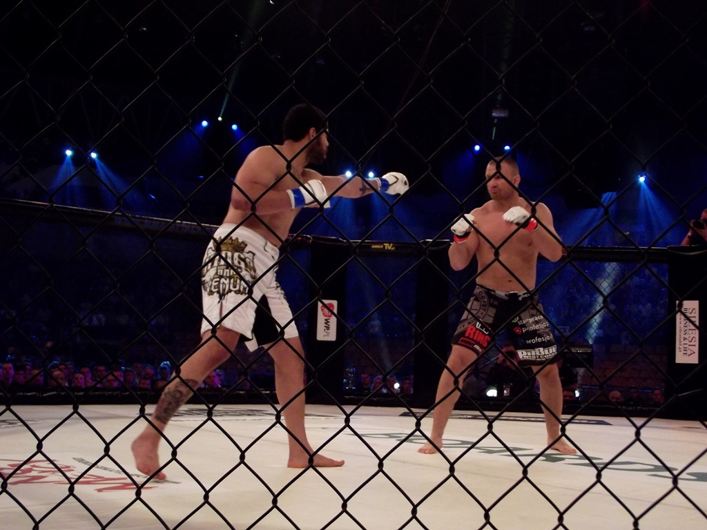 Zdjęcie zrobione podczas gali mieszanych sztuk walki MMA Attack 2 w katowickim Spodku.